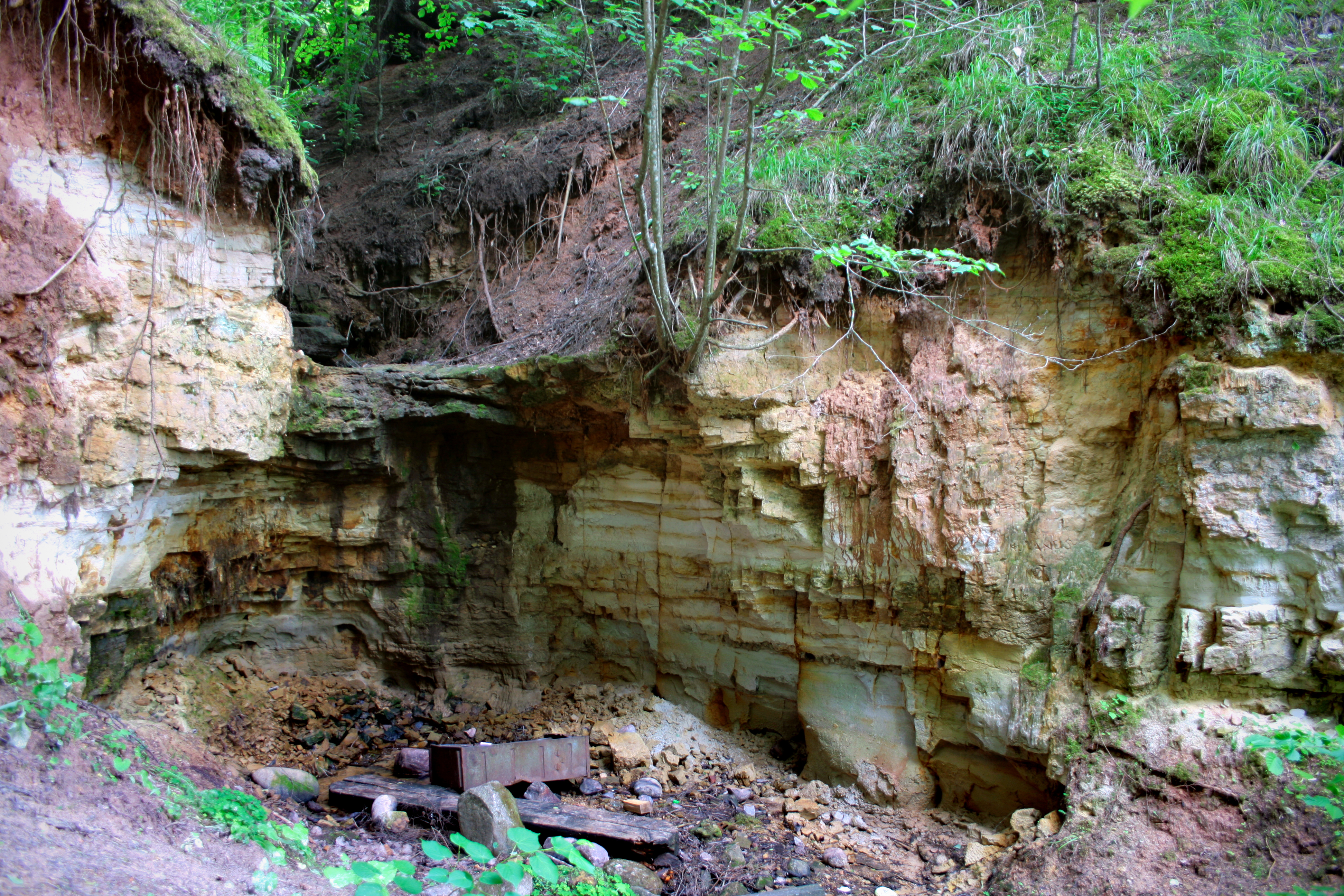 Vārme